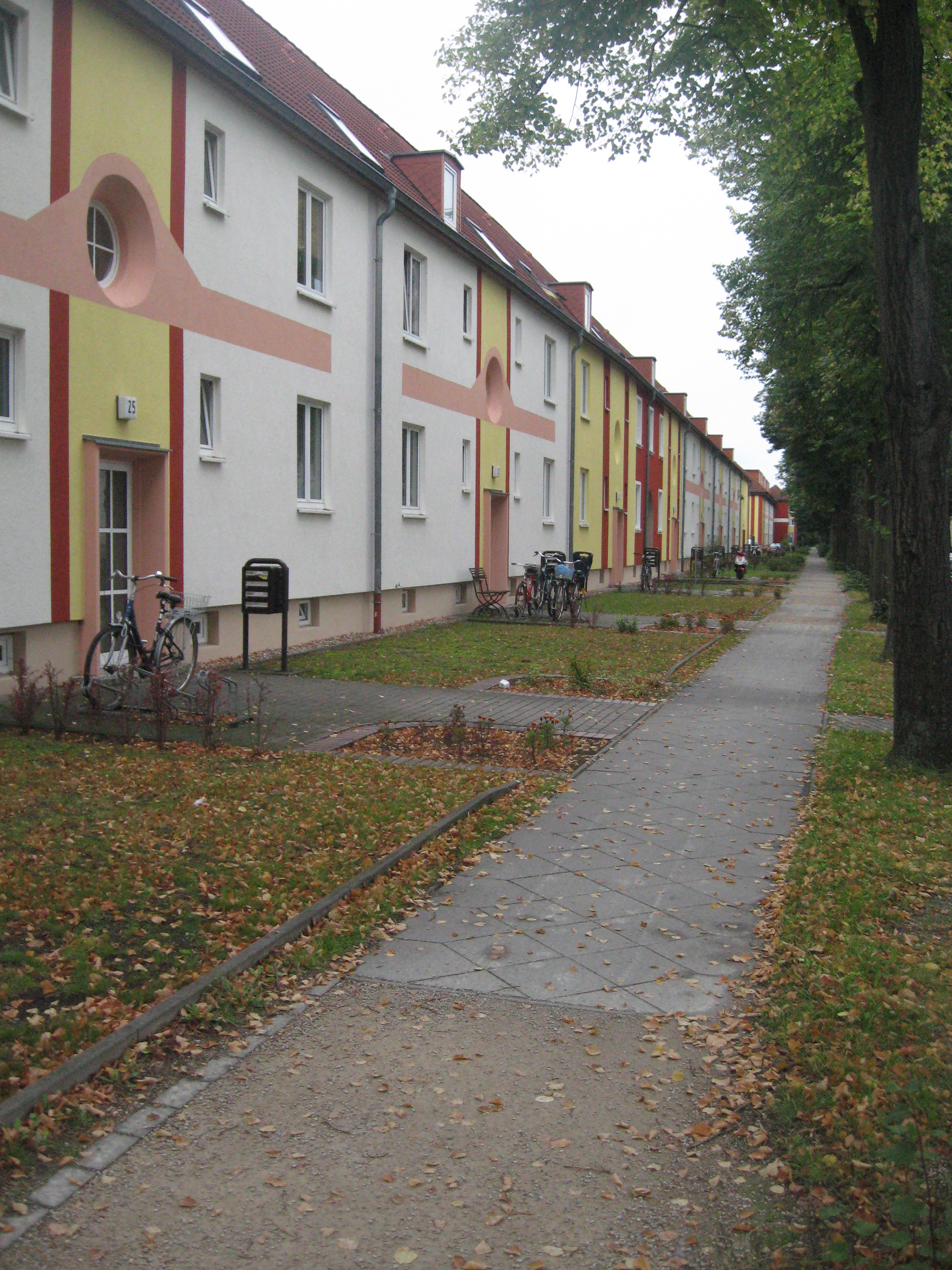 Ostseite der Artur-Becker-Straße, Blickrichtung Süden, Standort: vor Hausnummer 27